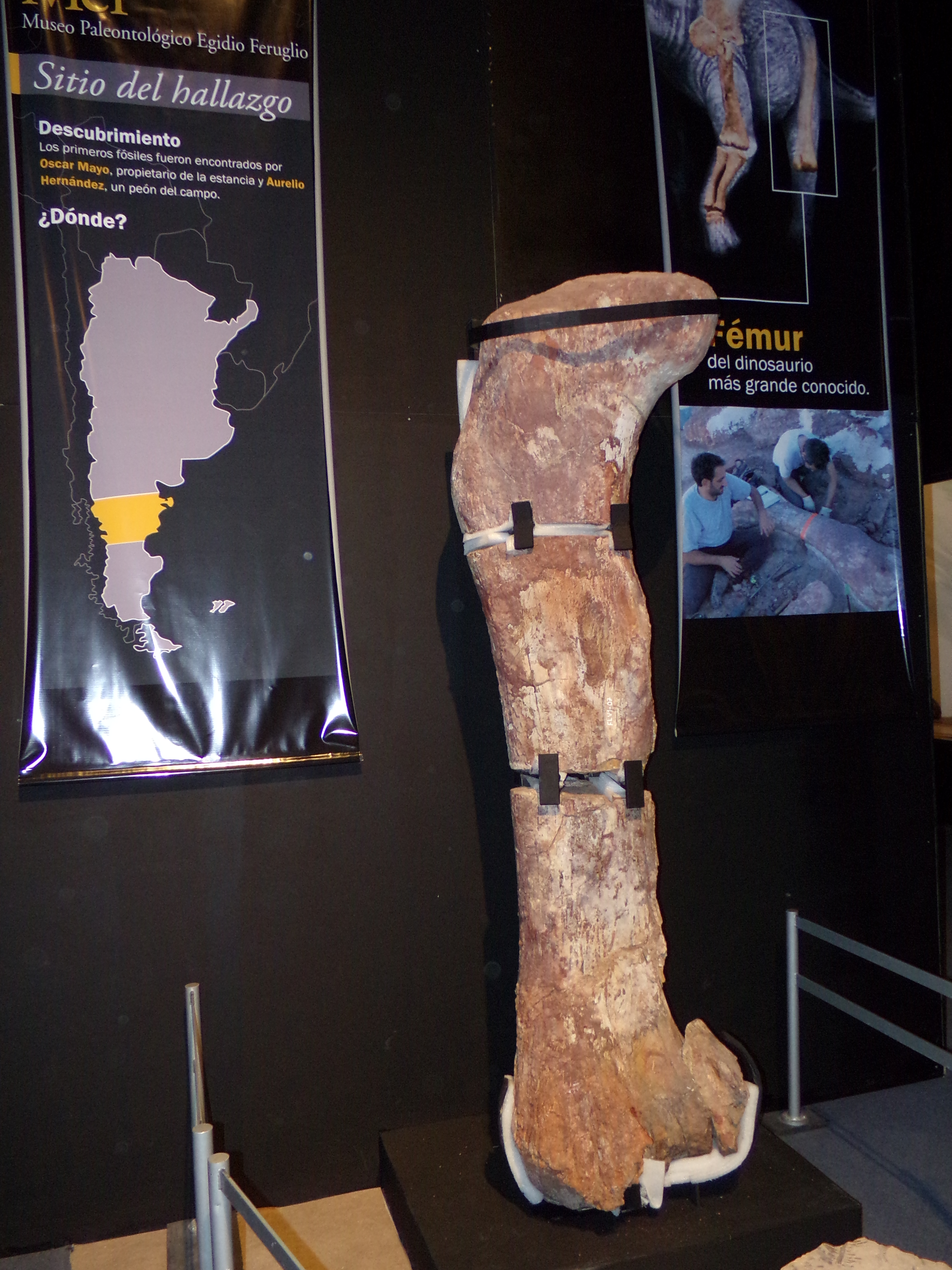 Fémur del Titanosauria del Chubut, MEF Trelew, junio de 2015.